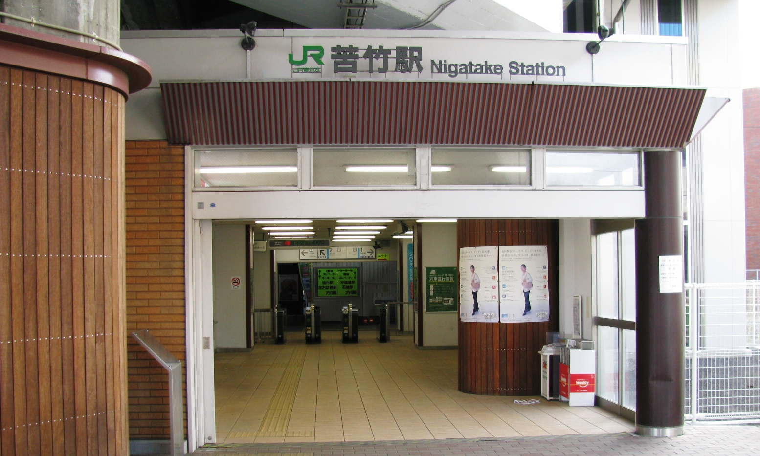 JR東日本仙石線苦竹駅 Nigatake Station. East Japan Railway Co.